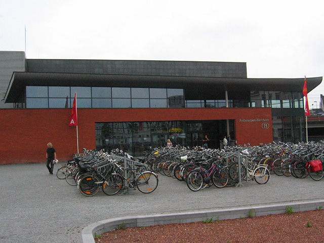 Station Antwerpen-Berchem